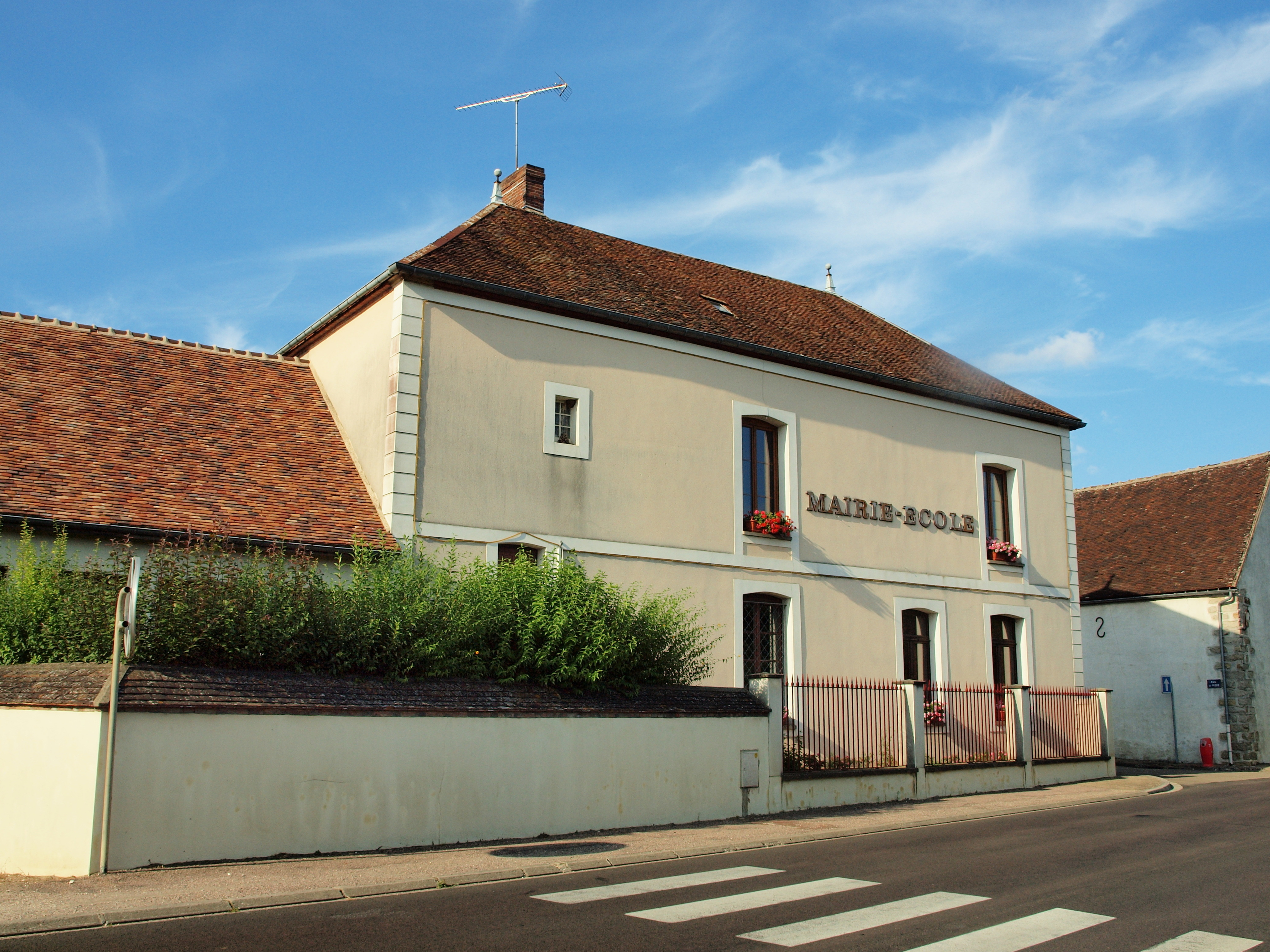 Malay-le-Petit (Yonne, France)